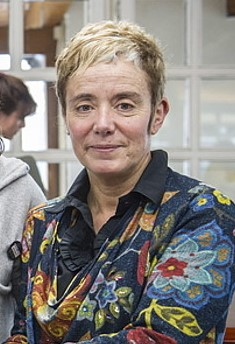 Bel Pozueta 2019ko urtarrilean Sarek Bilbon antolatutako solasaldian